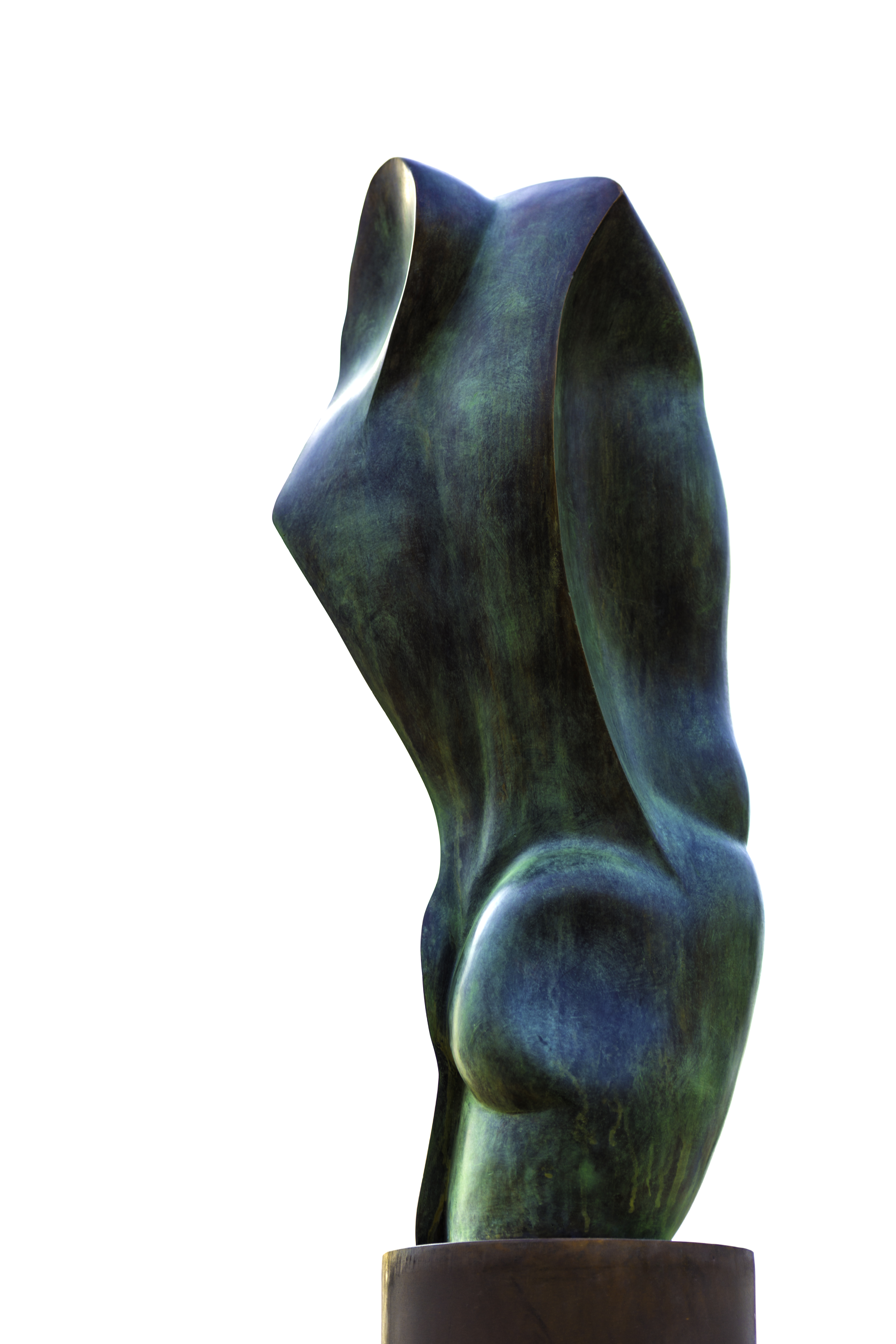 Torso (Escultura de Mustafa Arruf) ubicado en el Paseo Marítimo de Melilla. (2002)